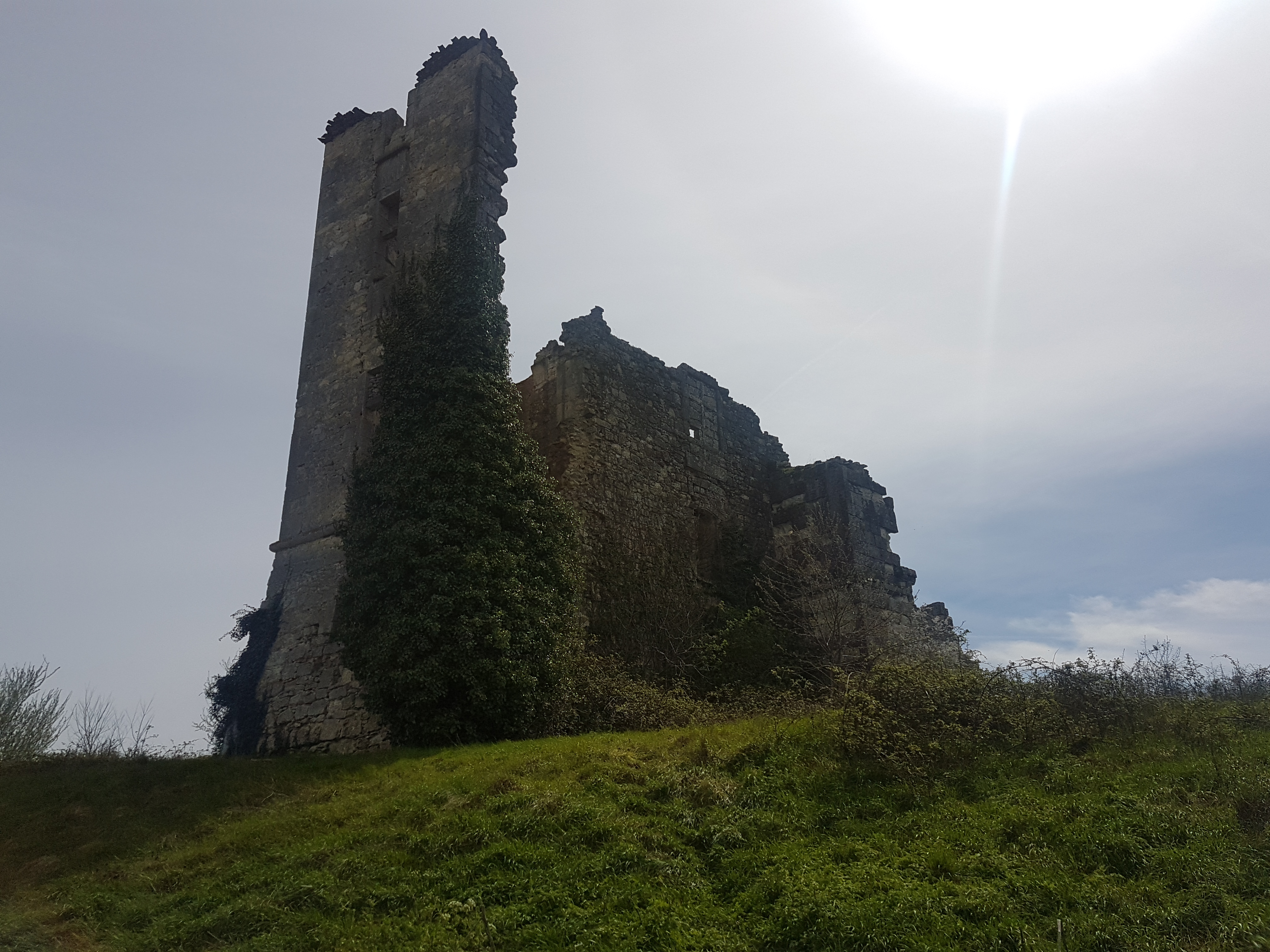 Château de Gachepouy à Castet-Arrouy dans le Gers